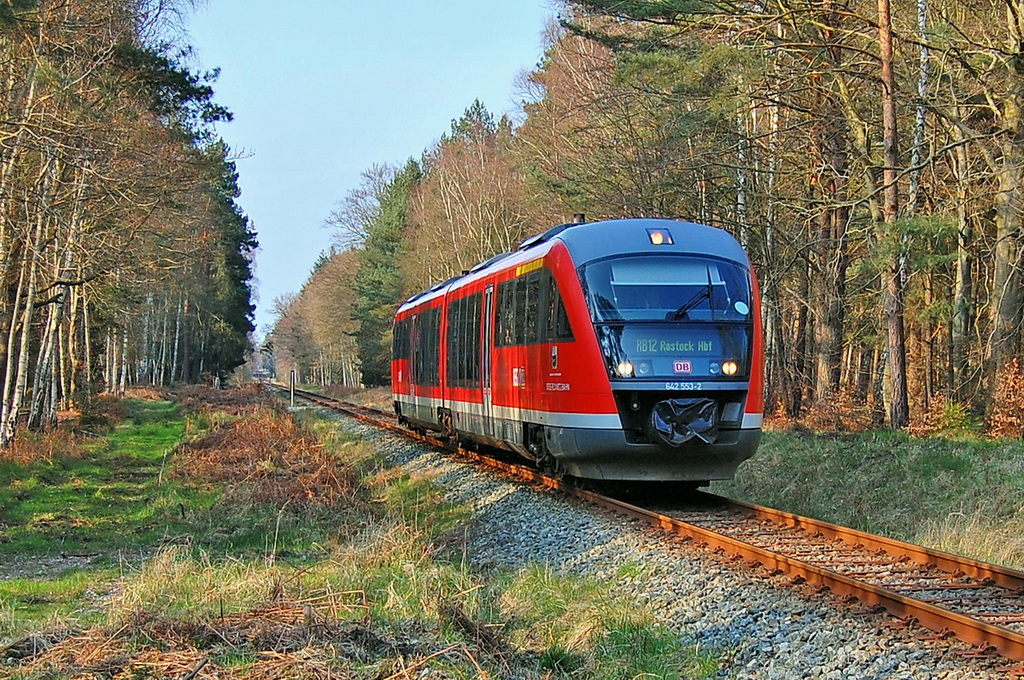 Dieseltriebwagen der Baureihe 642 auf der Bahnstrecke zwischen Rövershagen und Graal-Müritz.